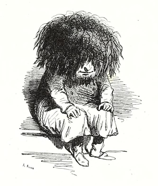 Caricature de Pierre Leroux en 1848-49 par Cham.